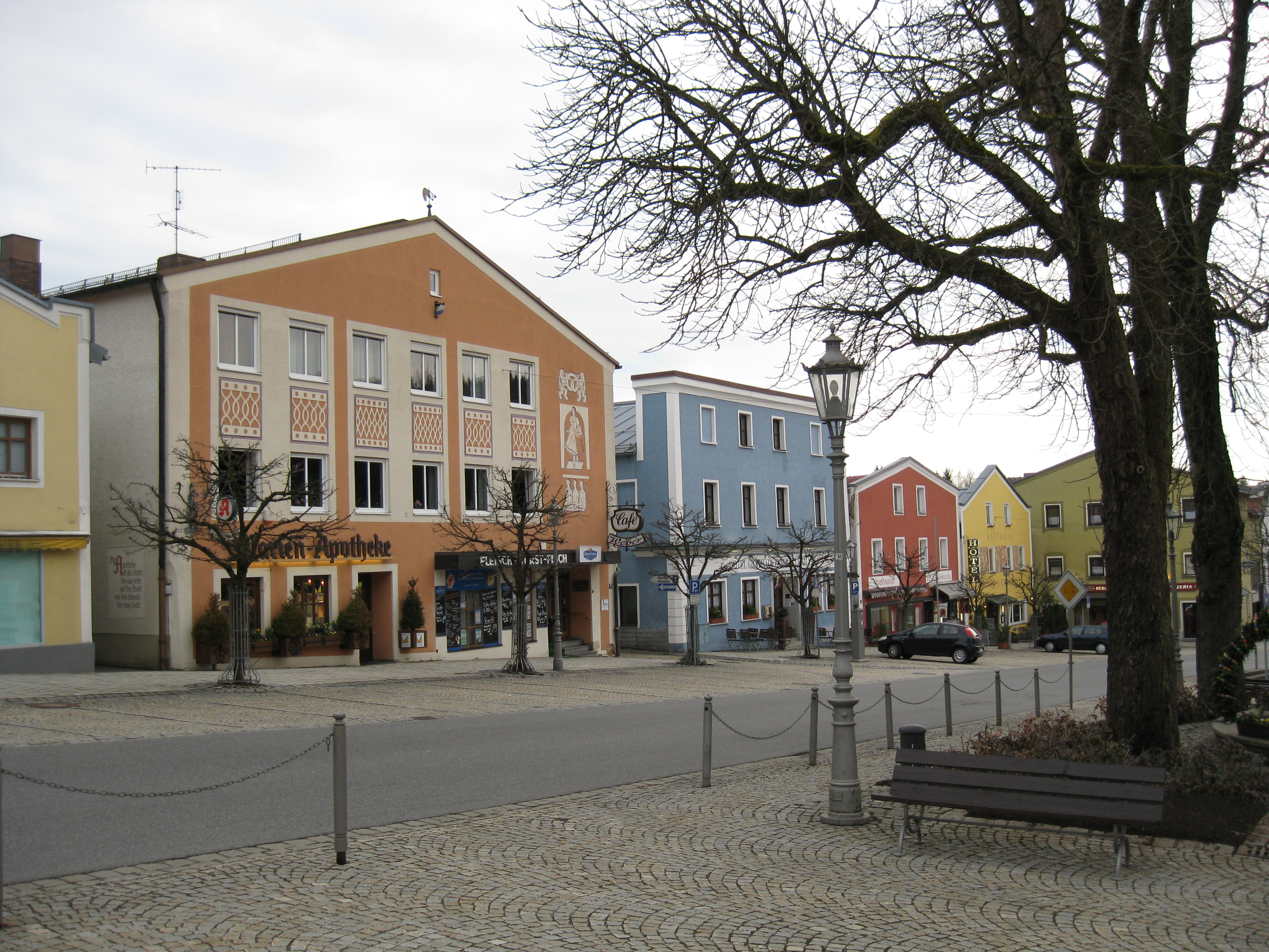 Bilder aus Grafenau